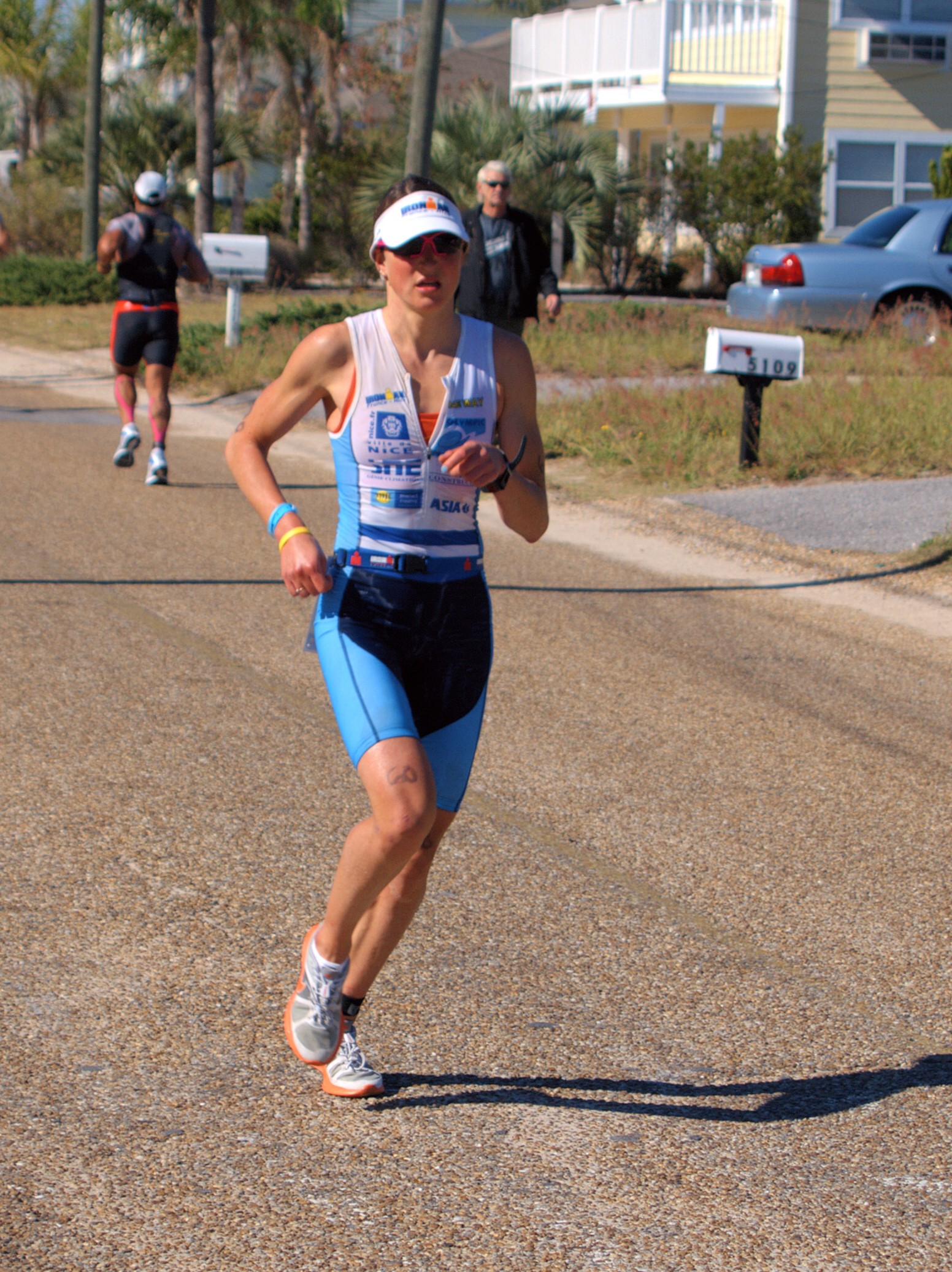 Jeanne Collonge Ironman Floride 2010